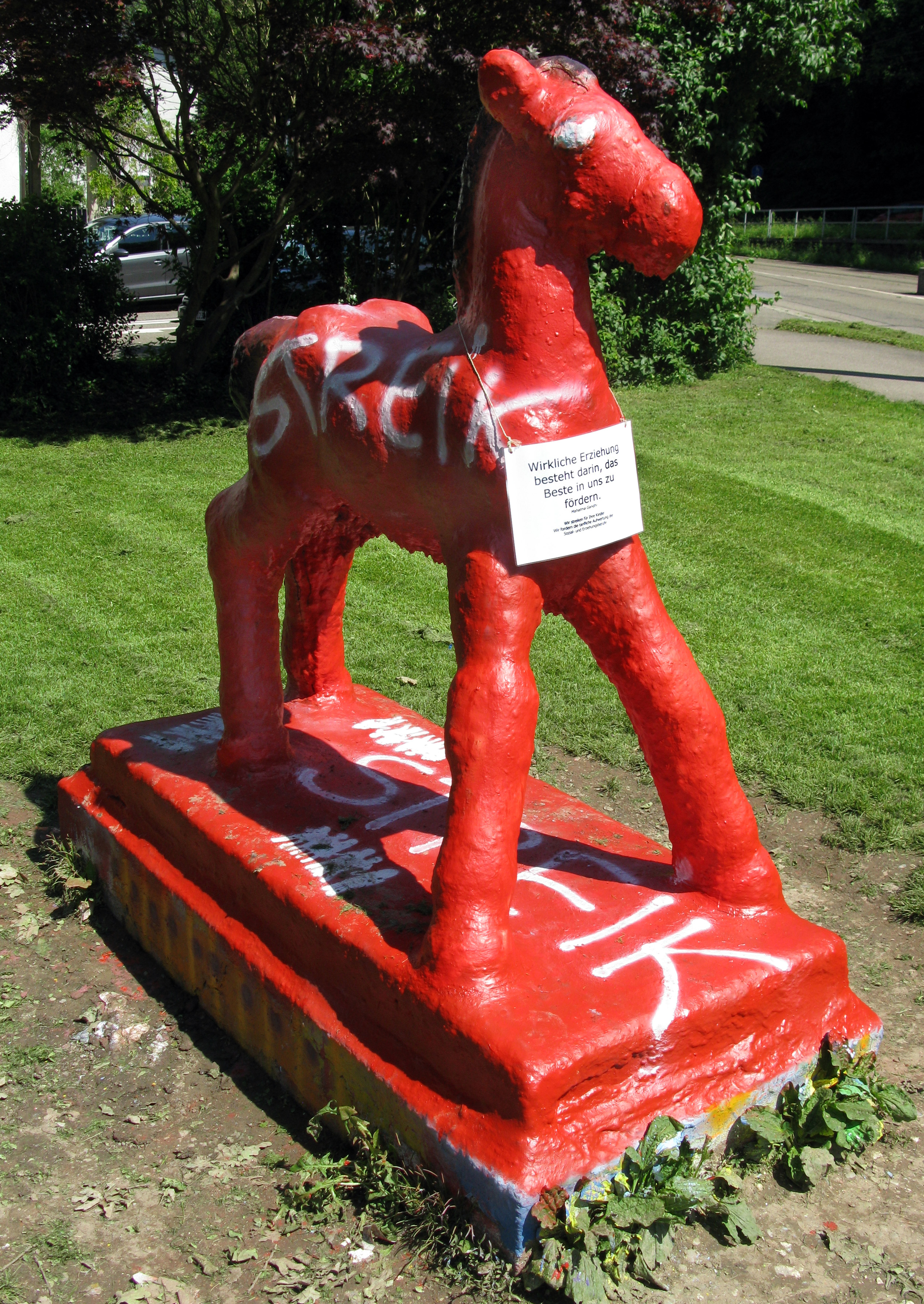 Das Holbeinpferd in Freiburg zu Zeiten des Streiks der Erzieherinnen und Erzieher